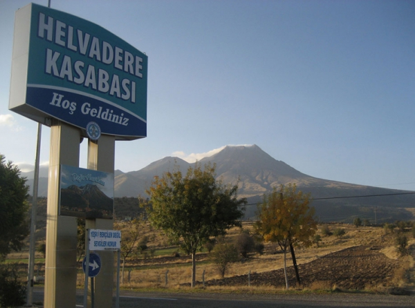 Helvadere'ye Giriş